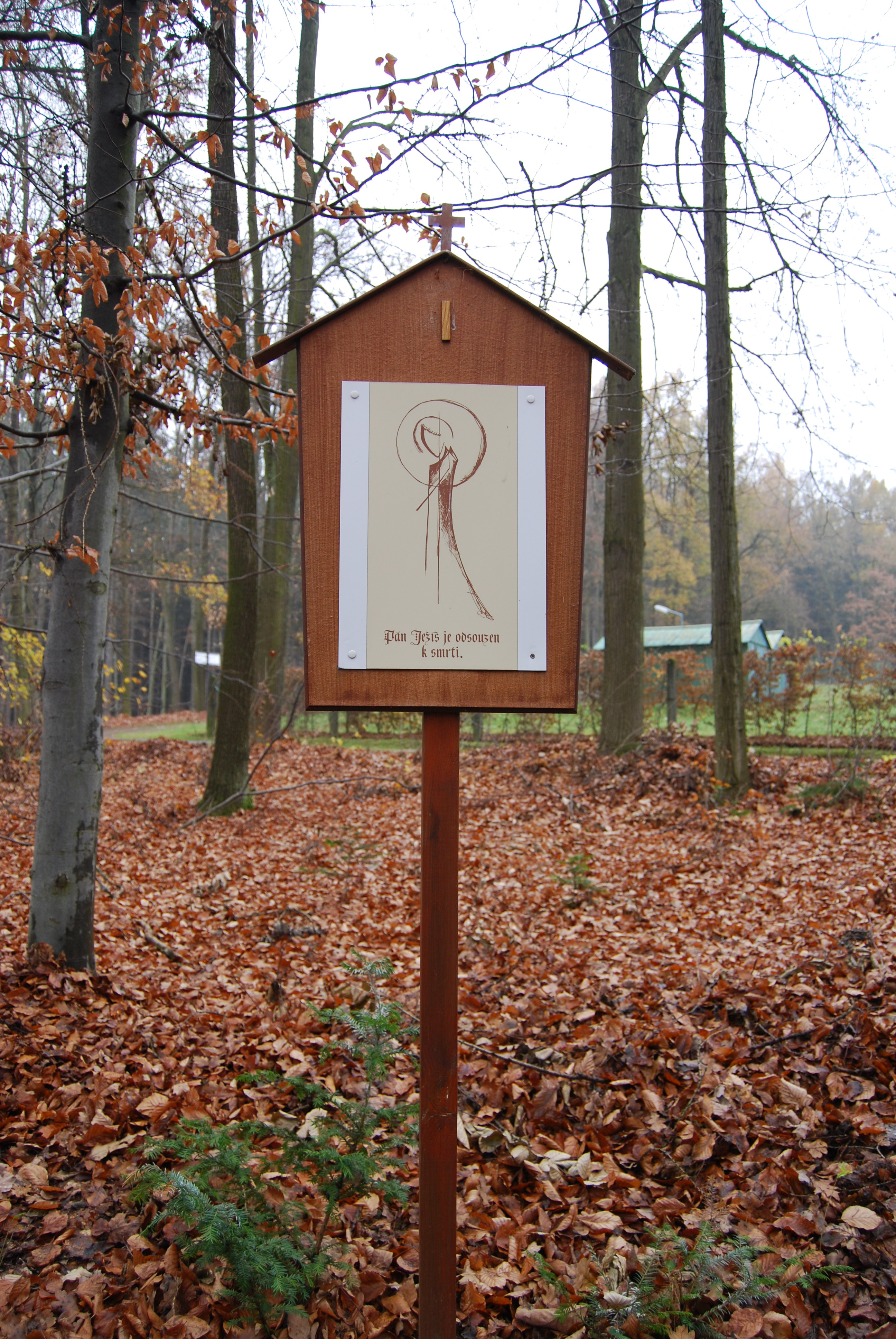 Křížová cesta. Jedno ze zastavení křížové cesty. Lomec - poutní místo u Netolic, v katastru vesnice Nestanice v okrese Strakonice. Česká republika.